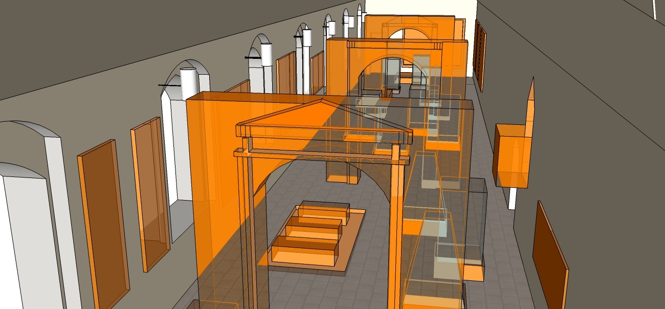 vista della sala 14 realizzata con sketchup